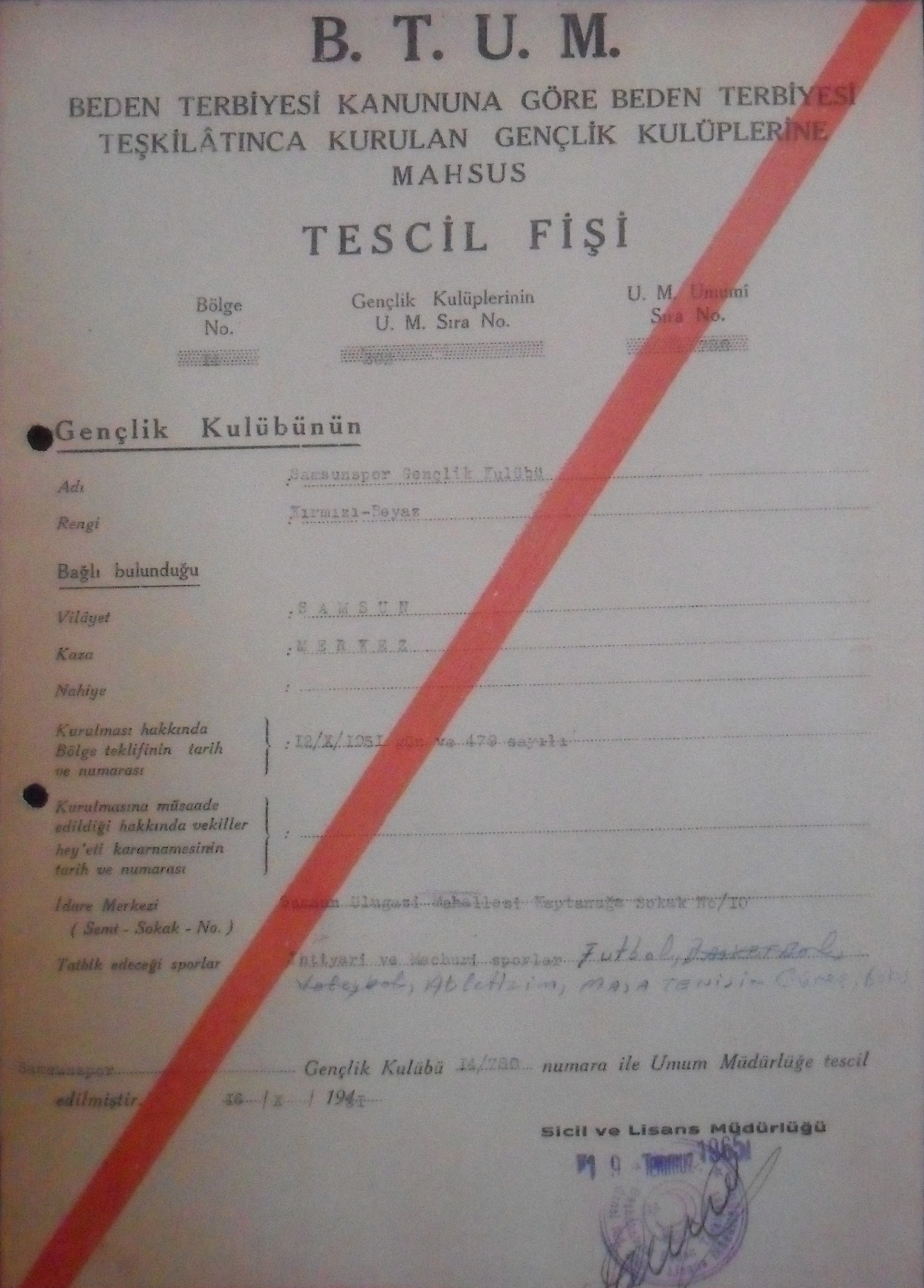 Samsun Kent Müzesi'nde sergilenen Samsunspor kuruluş tescil fişi.